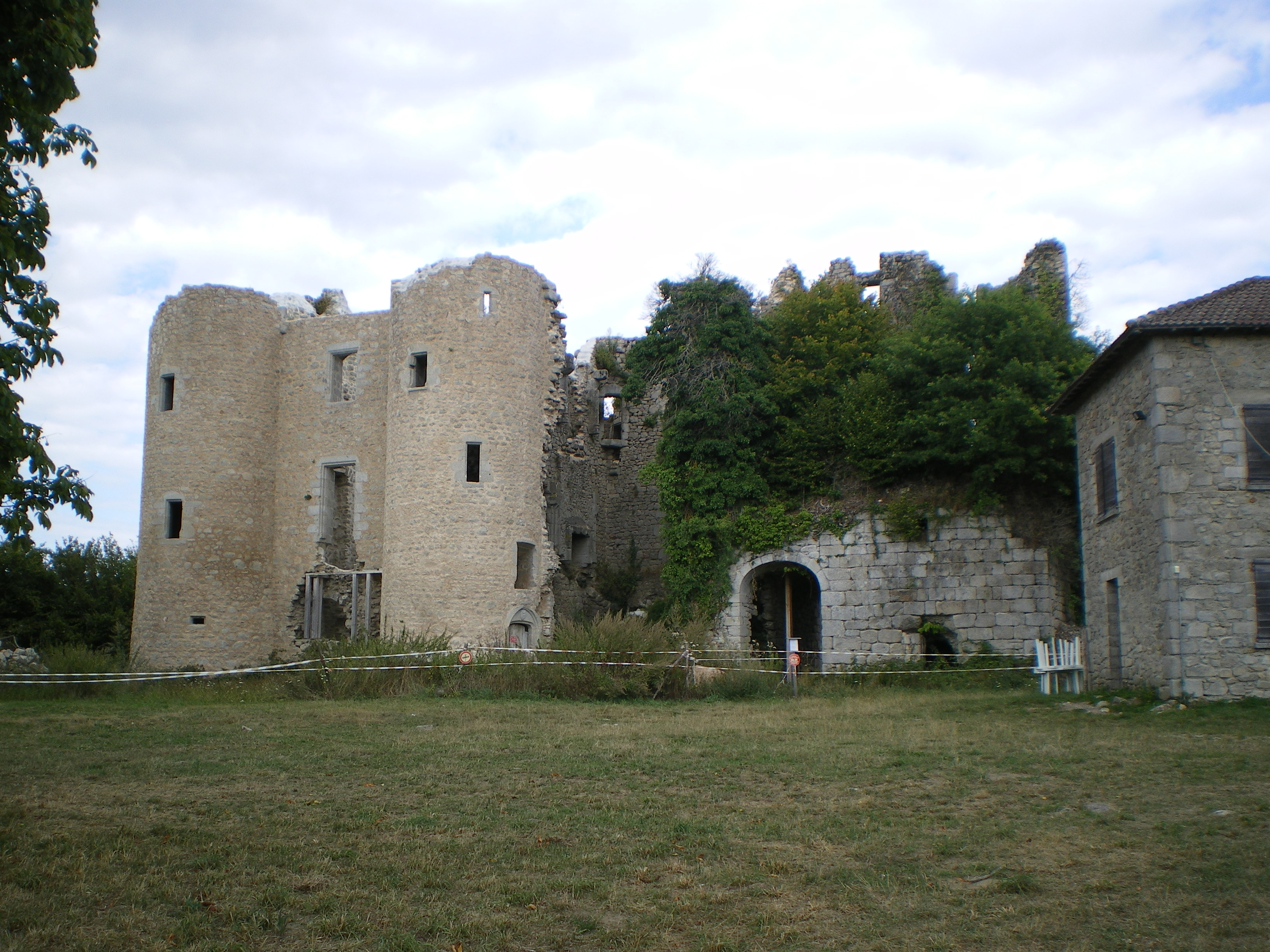 Château de Naucaze, Saint-Julien-de-Toursac, Cantal, France